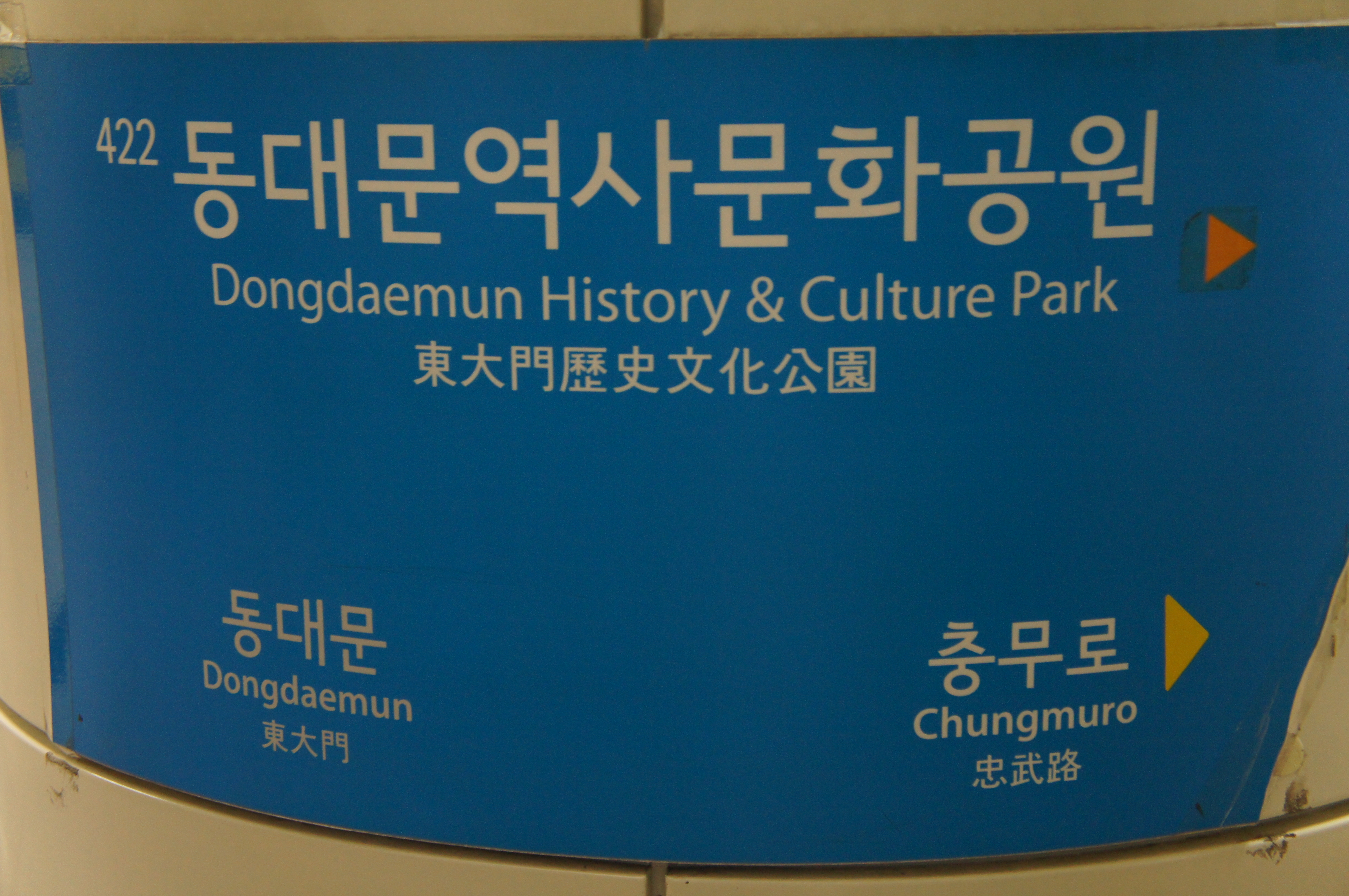 동대문역사문화공원역 4호선 승강장